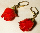 Boucles d'oreilles roses naturelles jaunes vitrifiées; création "Les Roses de Peyruis"